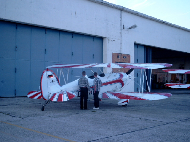 Würselen, Oldtimer-Flugtag am Flughafen Merzbrück